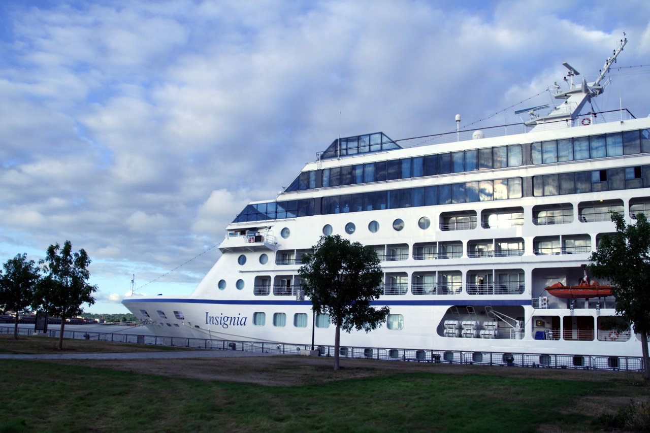 MS Insignia à Bordeaux